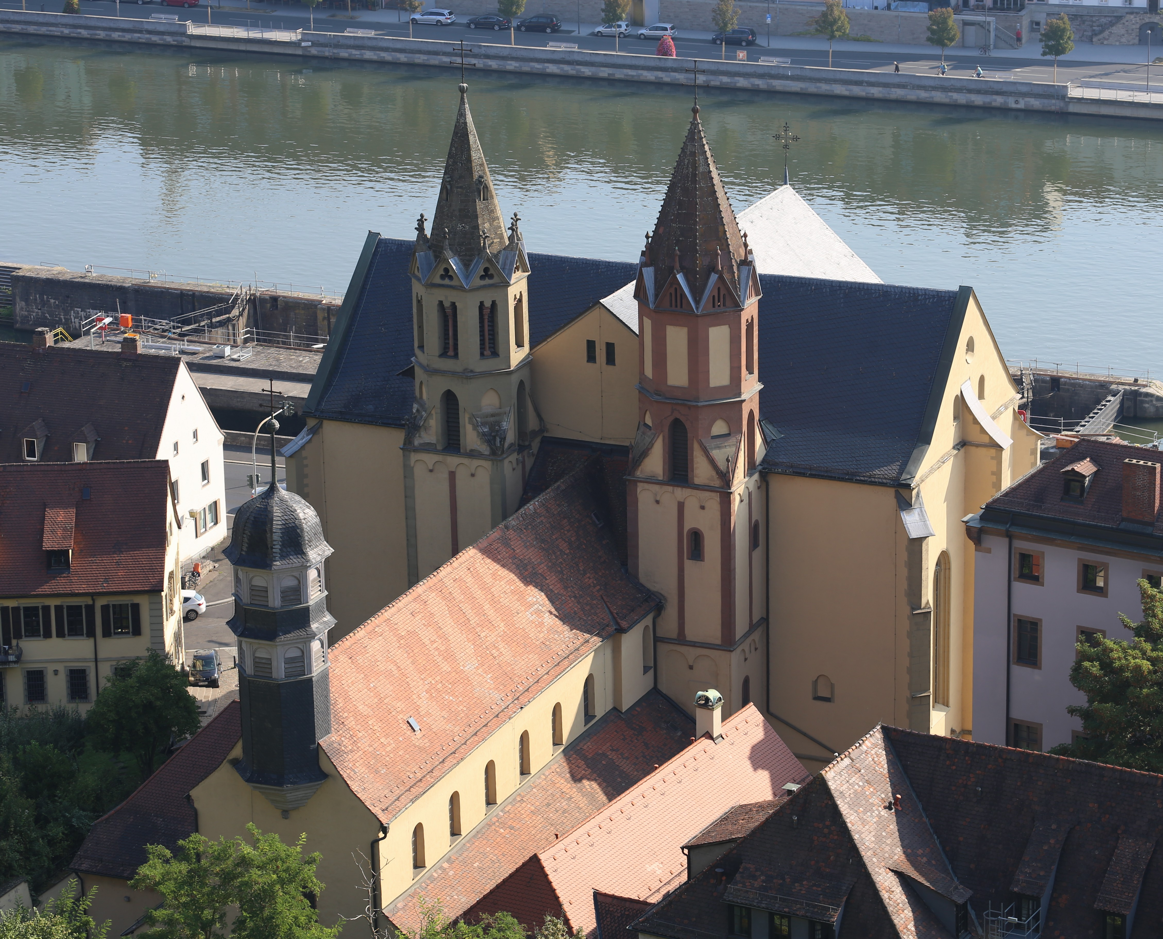 Burkarderstraße 42, Würzburg; Katholische Pfarrkirche St. Burkard, dreischiffige Basilika mit erhöht über einer Straßendurchfahrt liegendem 5/8-Chor und breitem Querschiff, Sattel- und Pultdächer, in den Zwickeln zwischen Langhaus und Querschiff ursprüngliche Chorflankentürme mit achteckigen Obergeschossen und steinernen Turmhelmen, Langhaus mit haubenbedecktem Giebelreiter über Konsole, auf der Nordseite offene Vorhalle mit Rundbögen und Walmdach, Putzmauerwerk mit Sandsteingliederungen diverser Epochen, Kernbau mit Langhaus und Türmen romanisch, 11.–13. Jahrhundert, Vorhalle um 1170, Chor und Querschiff spätgotisch, 15.–17. Jahrhundert, Straßendurchfahrt bezeichnet „1491“, historisierende Erneuerung 1857/58 und 1894, Wiederherstellung nach Teilzerstörung 1948; mit Ausstattung